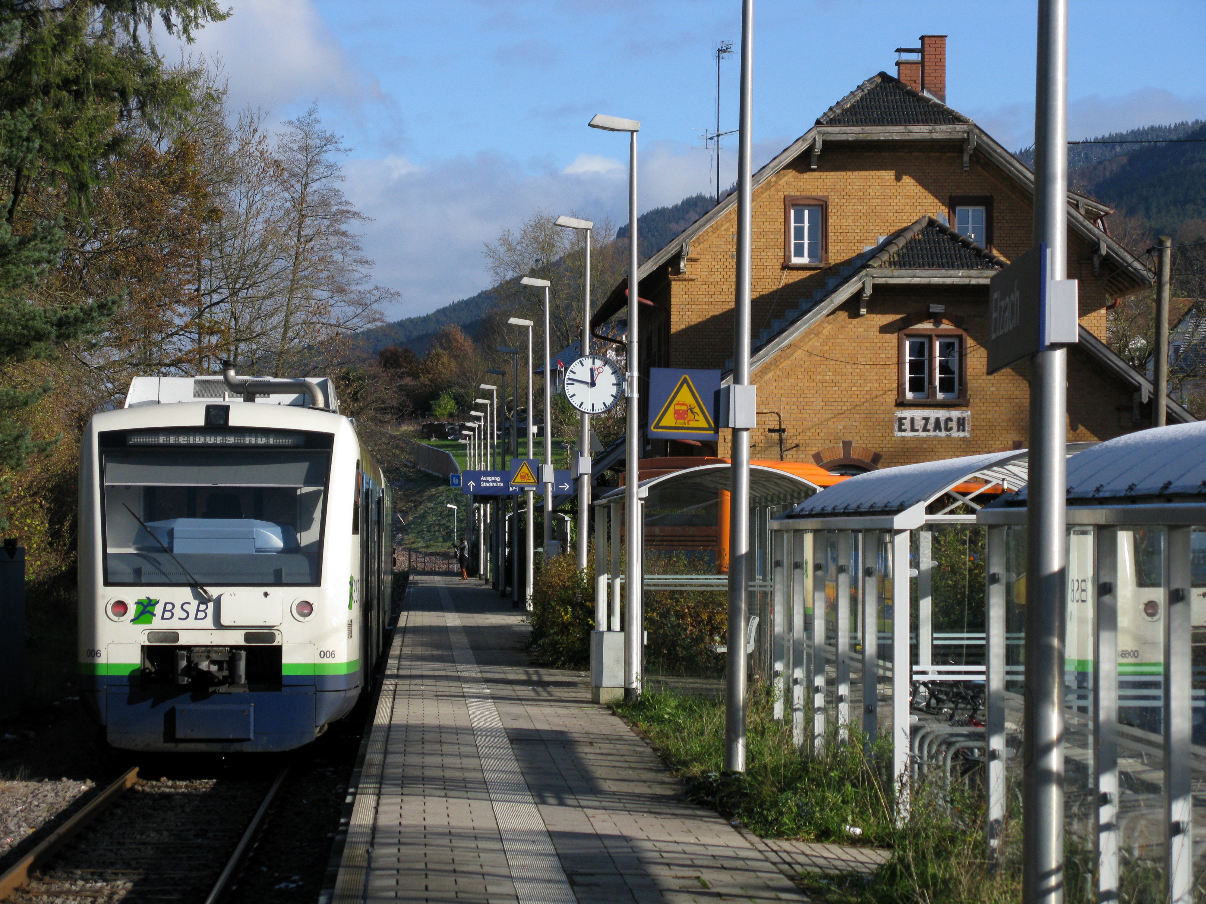 Bahnhof Elzach mit Regio-Shuttle-Triebwagen